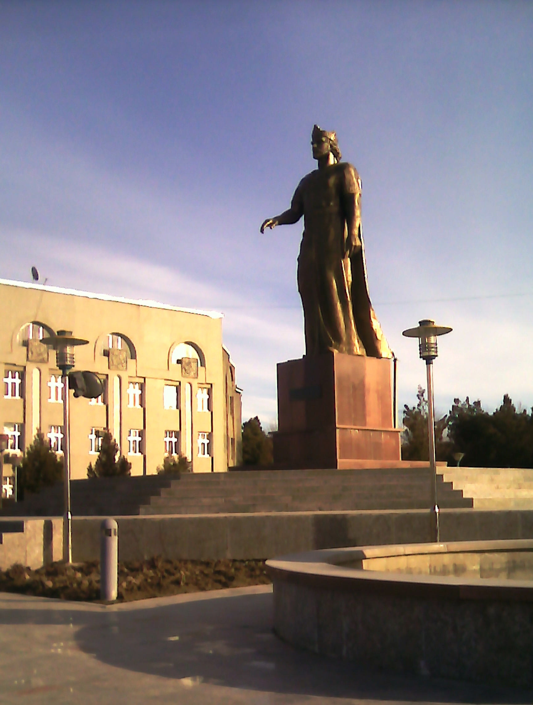 Монумент И. Самани в г Панджакенте, Таджикистан Тоҷикӣ: Ҳайкали Исмолили Сомонӣ дар ш. Панҷакент